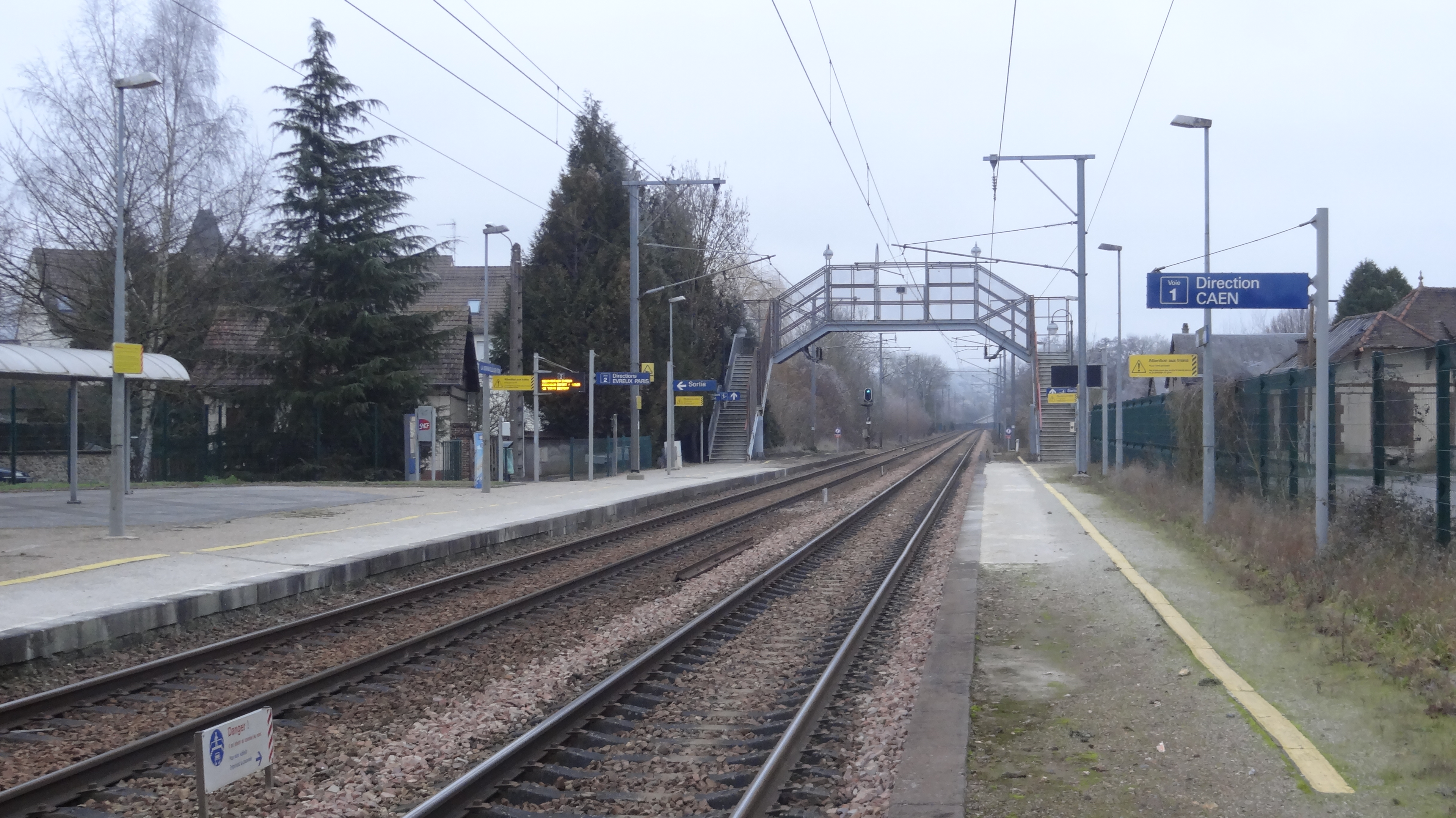 Vue d'ensemble de la gare de La Bonneville-sur-Iton, département de l'Eure, France, depuis le quai de la voie 1.